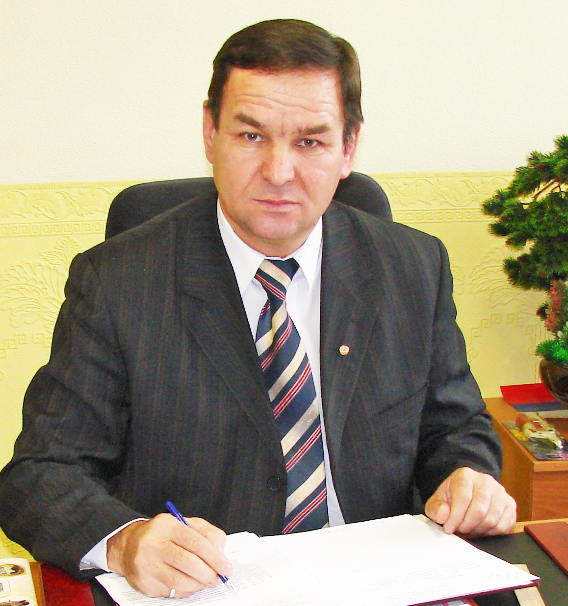 Руководитель Башкирского научно-исследовательского центра по пчеловодству и апитерапии, доктор биологических наук, профессор Башҡортса: Башҡортостан умартасылыҡ һәм апитерапия фәнни-тикшереү үҙәге етәксеһе, биология фндре докторы, профессор